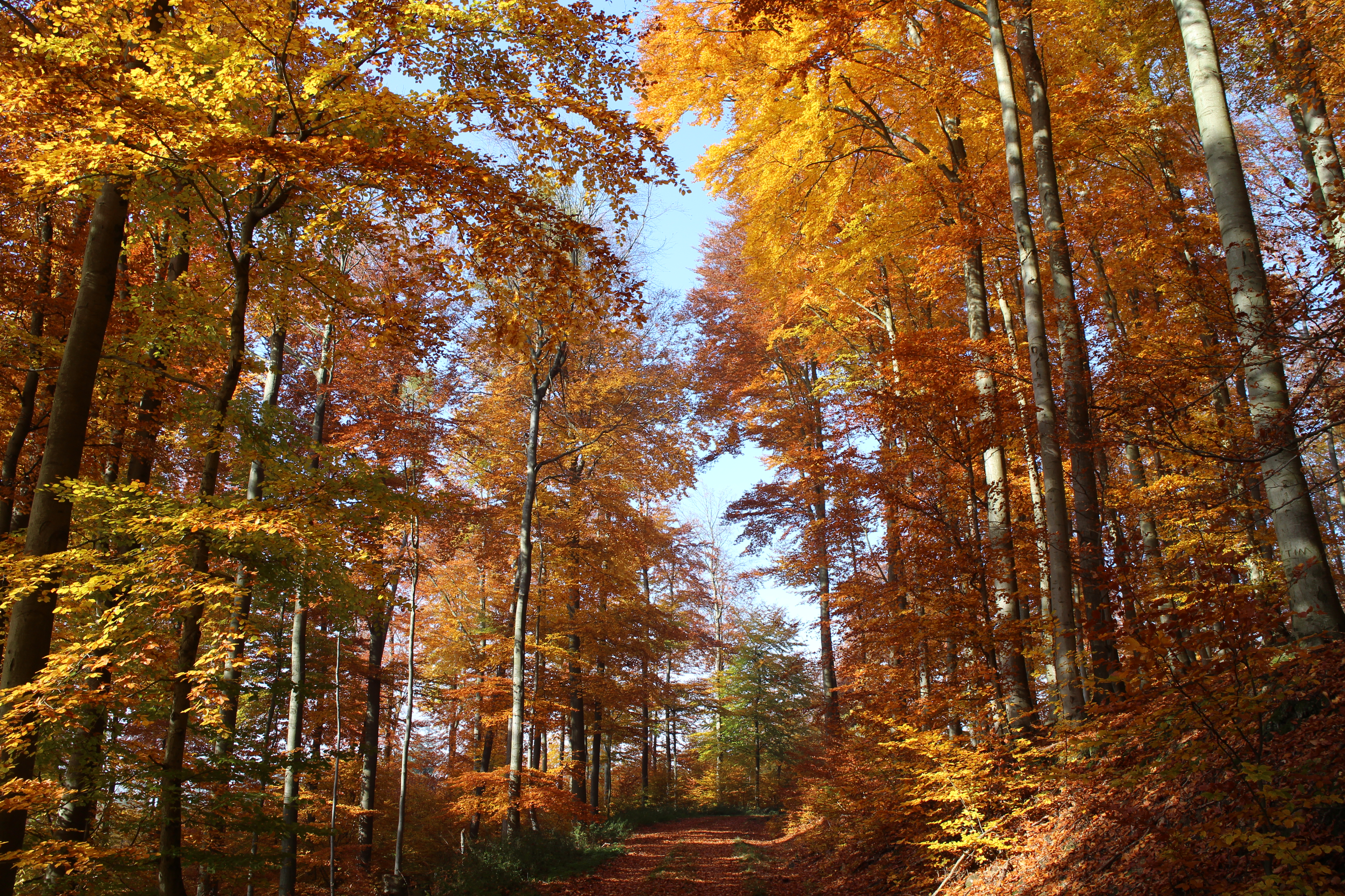 Das Bild zeigt den Buchenwald am Trommabhang bei Zotzenbach im Herbst 2015; FFH-Gebiet DE-6318-304 „Tromm“ im Naturpark Bergstraße-Odenwald in Südhessen.